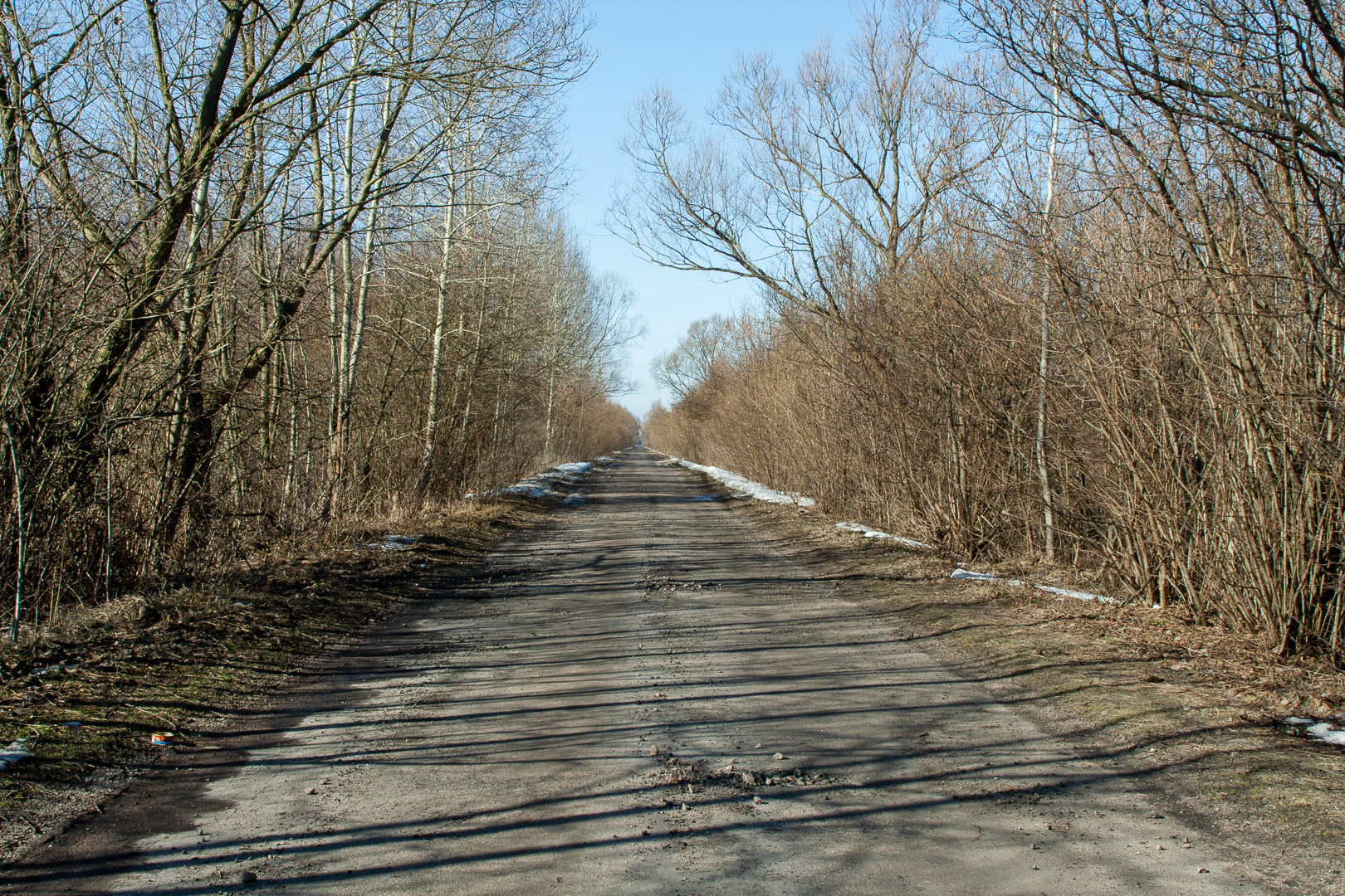 Carska Droga (Carski Trakt, Carska Szosa), Biebrzański Park Narodowy, 26 marca 2005. This is a photography of Natura 2000 protected area with ID PLB200006 This is a photography of Natura 2000 protected area with ID PLH200008